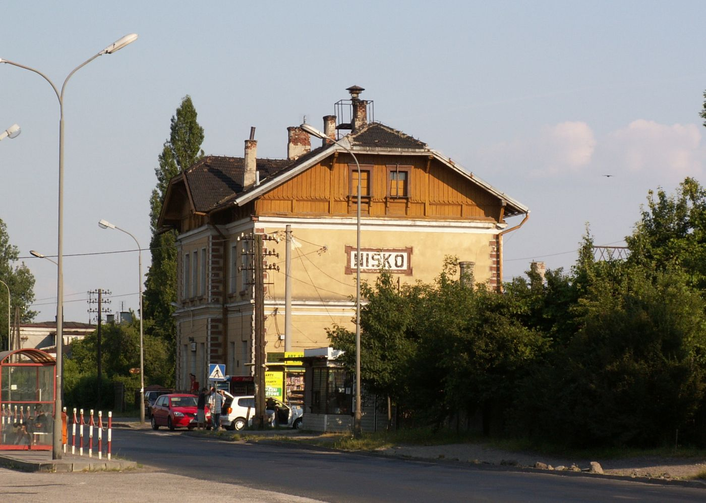 Nisko - Budynek dworca PKP